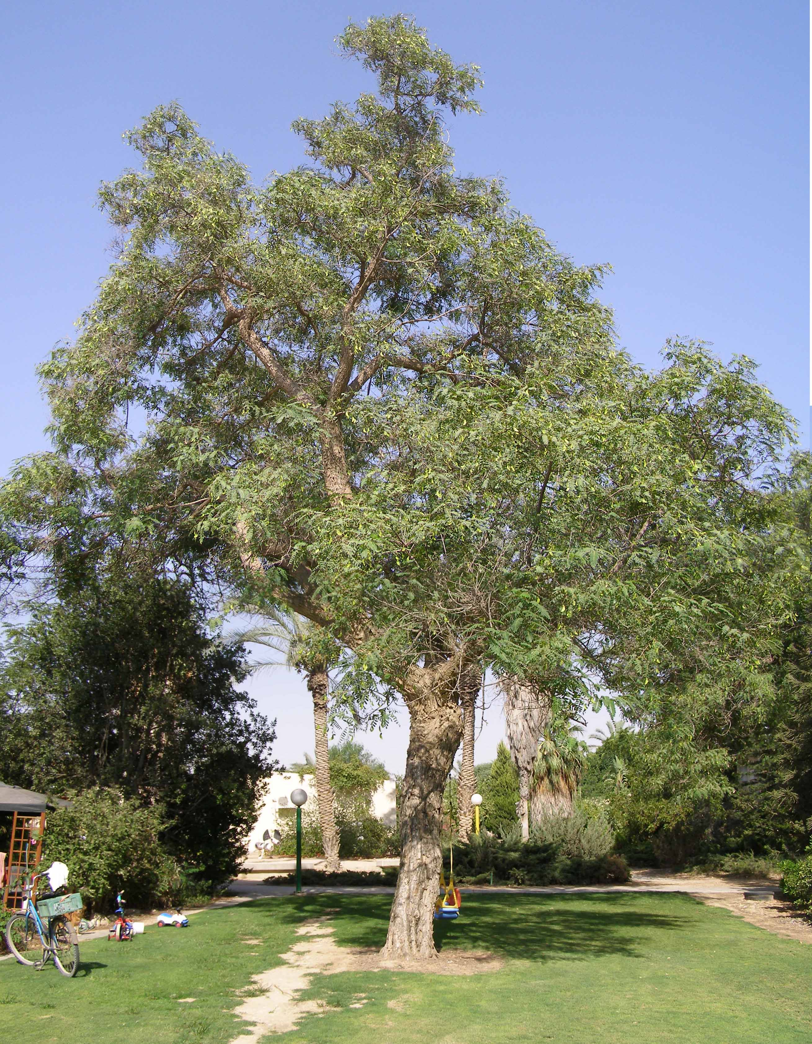 Tipuana tipu Tree in Revivim, Israel